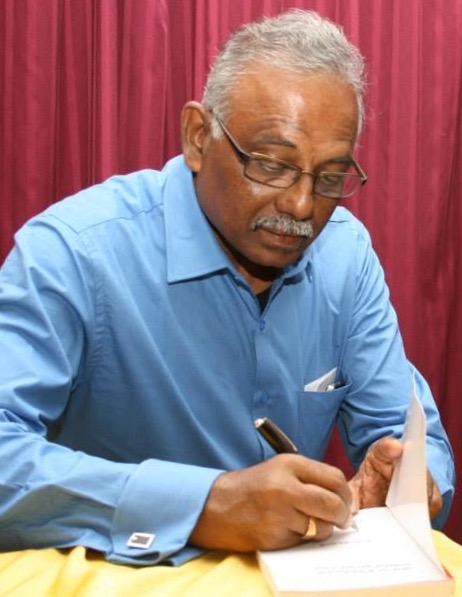 கலாநிதி ந. இரவீந்திரன்